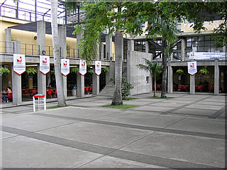 Facultad de Salud de La Universidad del Valle. Cali, Colombia.